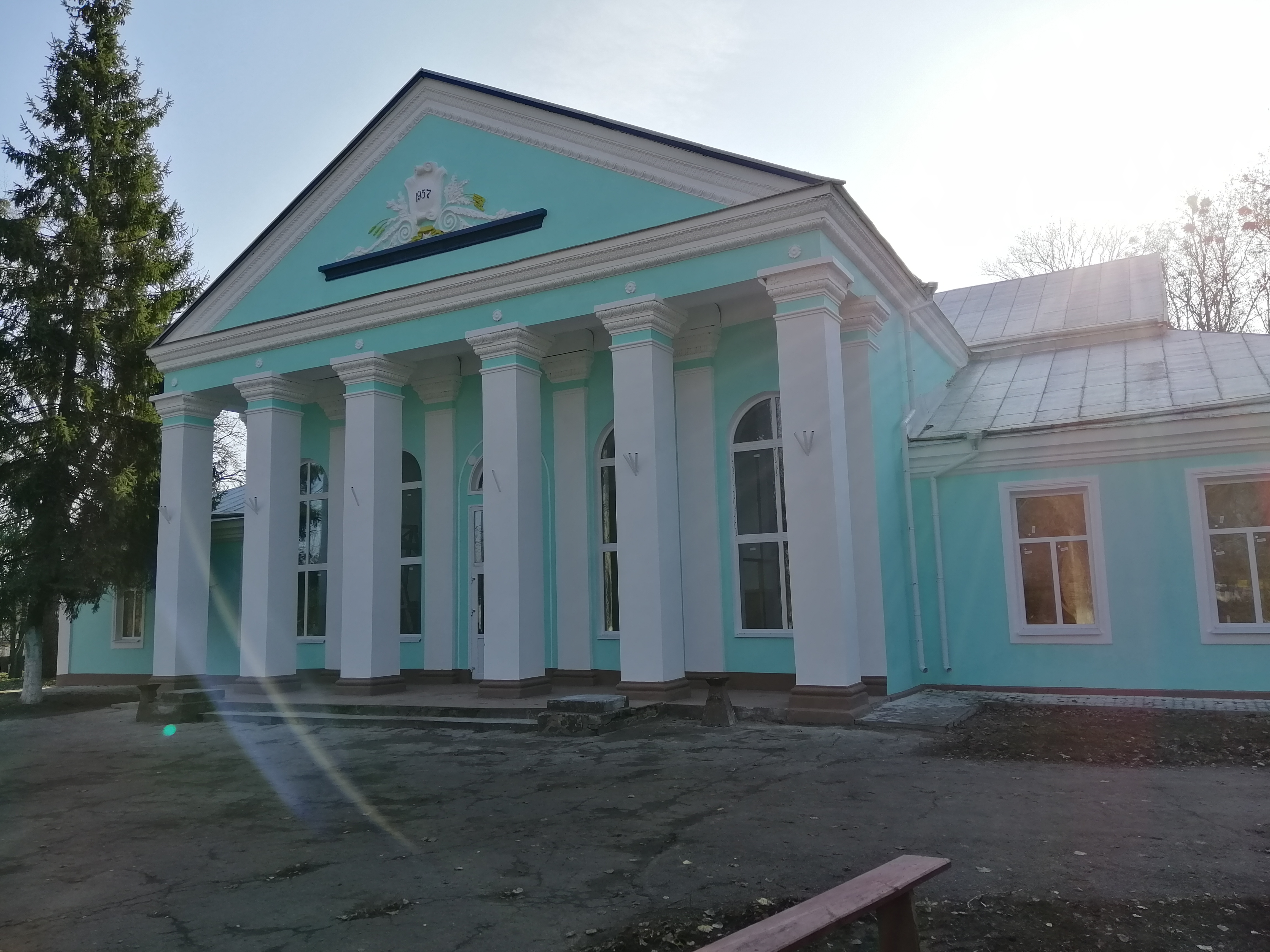 Дом культуры в с. Тарасенково, построенный в 1957 году